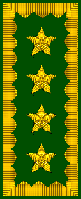 presilla de General Director de carabineros de Chile